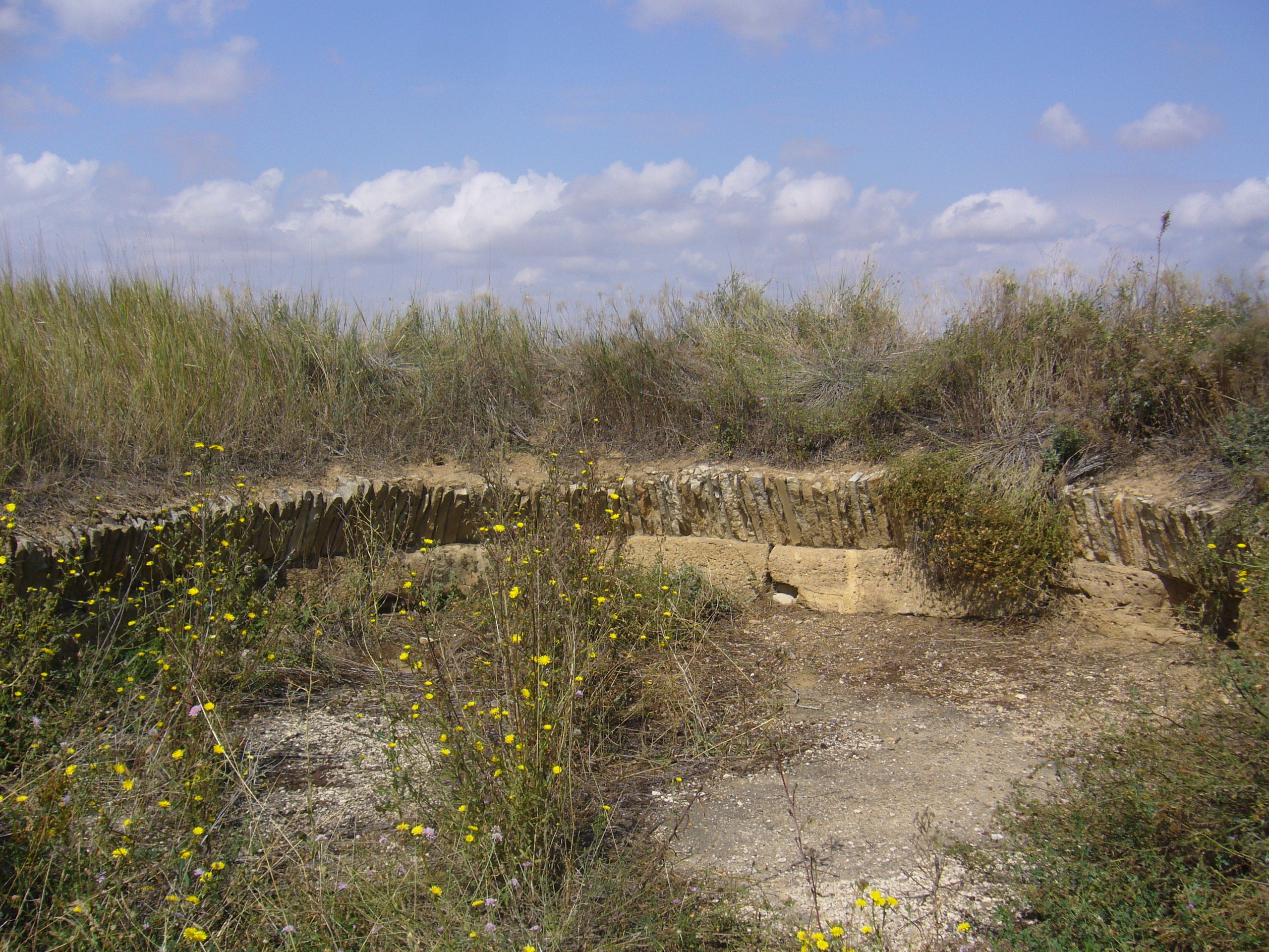 Yacimiento Neolítico de La Velilla, Osorno, Palencia, Castilla y León, España